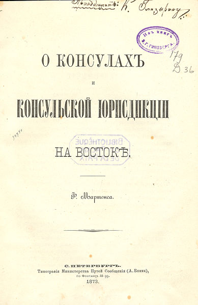 Titelseite der Veröffentlichung „О консулах и консульской юрисдикции на Востоке“ (deutsch: „Das Consularwesen und die Consularjurisdiction im Orient“) des russischen Juristen und Diplomaten Friedrich Fromhold Martens.